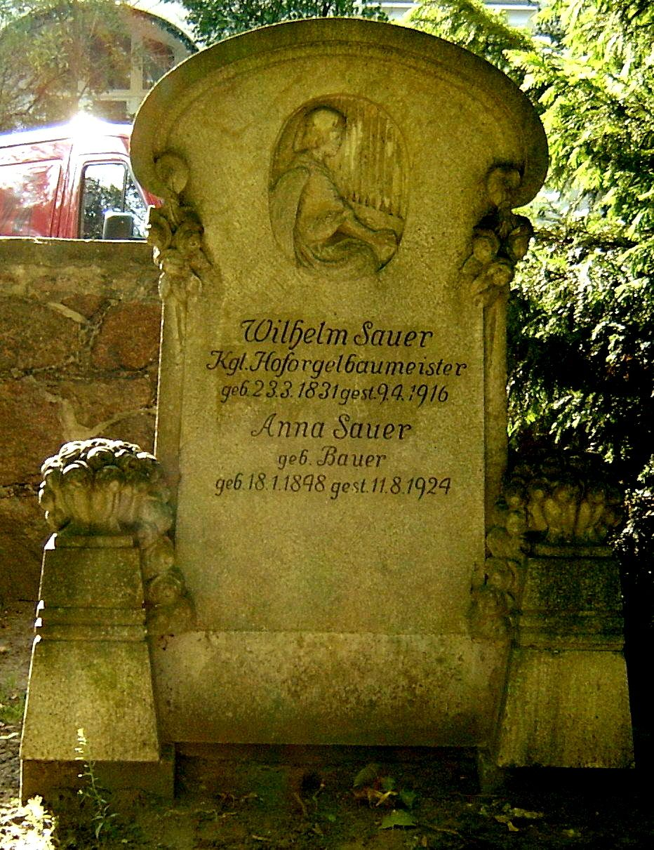 Grabstein für den Orgelbauer Wilhelm Sauer im Kleistpark in Frankfurt (Oder)